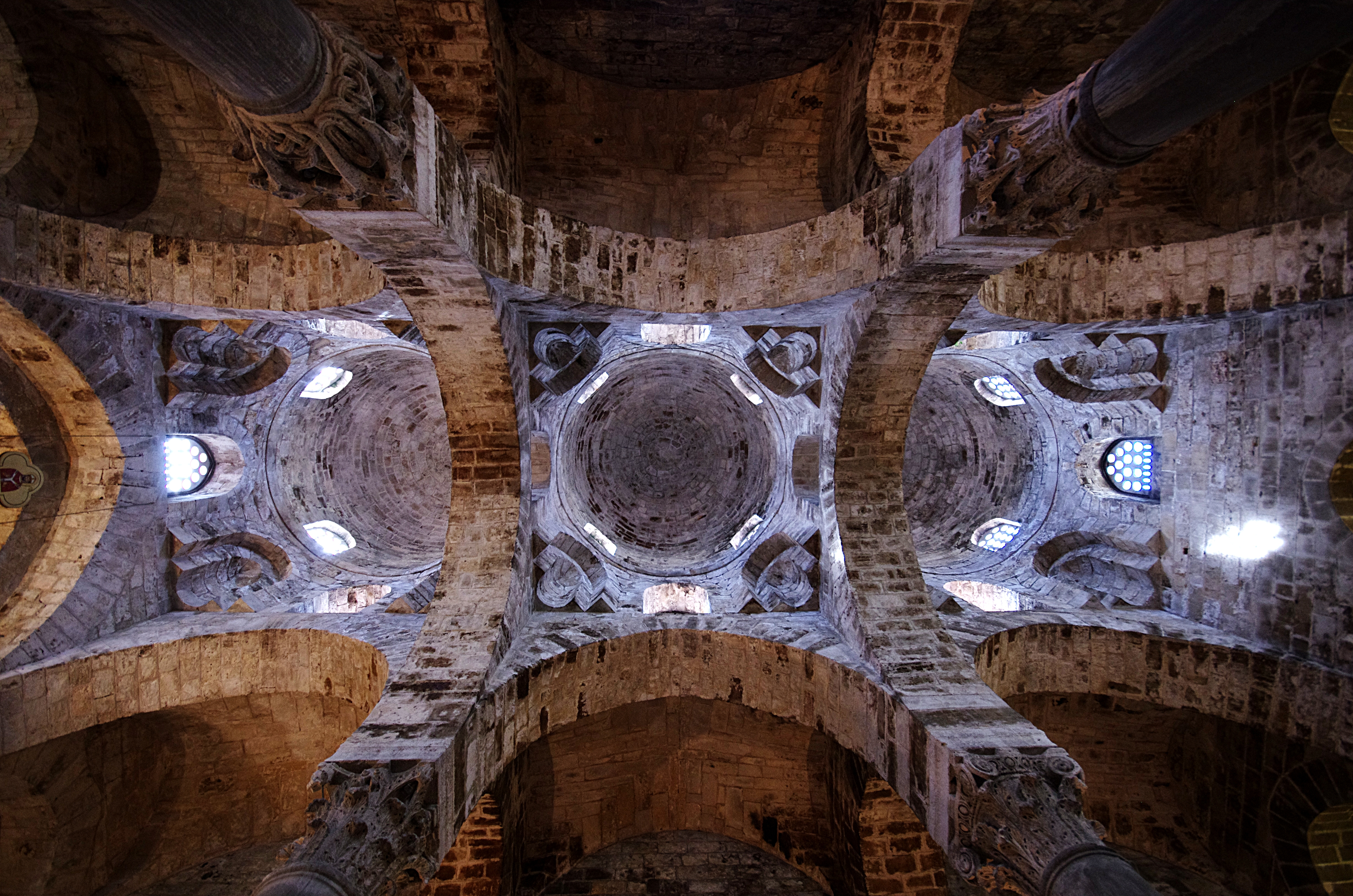 Kirche San Cataldo in Palermo. Die drei Kuppeln von Innen, ein Mosaik war nie vorhanden.